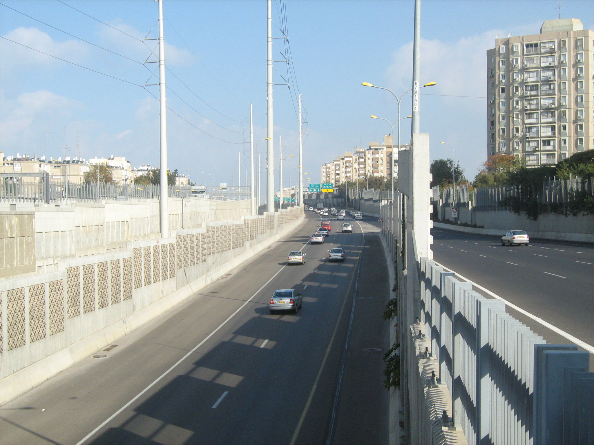 נתיבי איילון ממחלף יוספטל